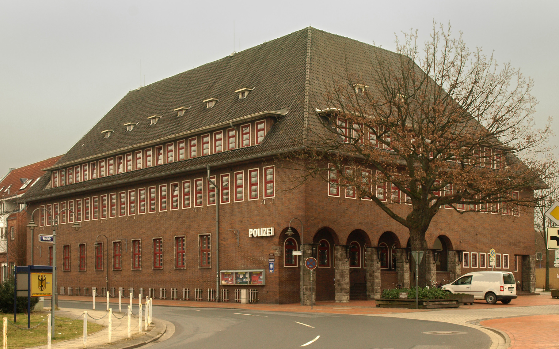 Meppen (Niedersachsen), Högerhaus, Foto: 2012